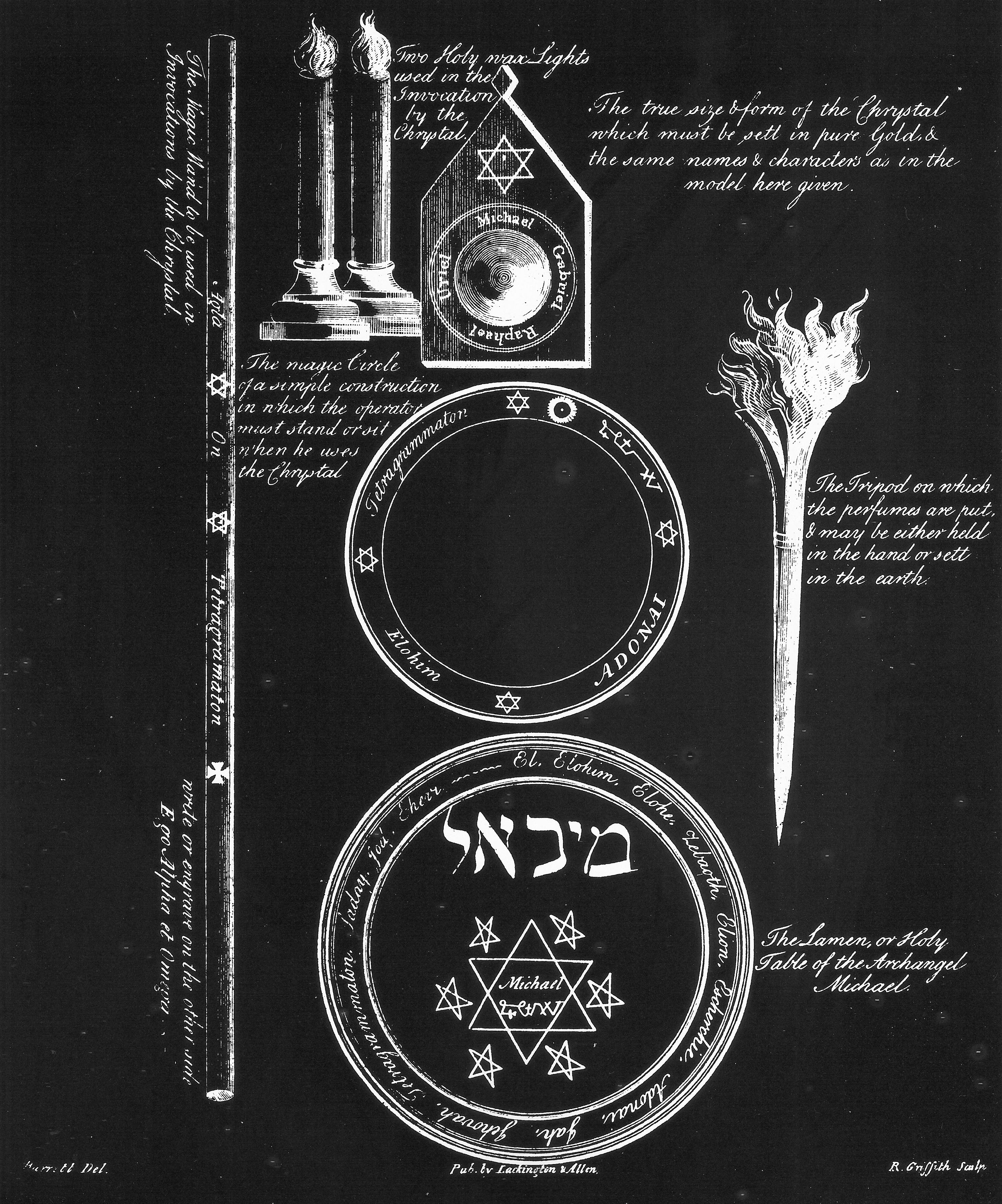 Magische Symbole und Geräte aus Francis Barrett "The Magus" (1801)